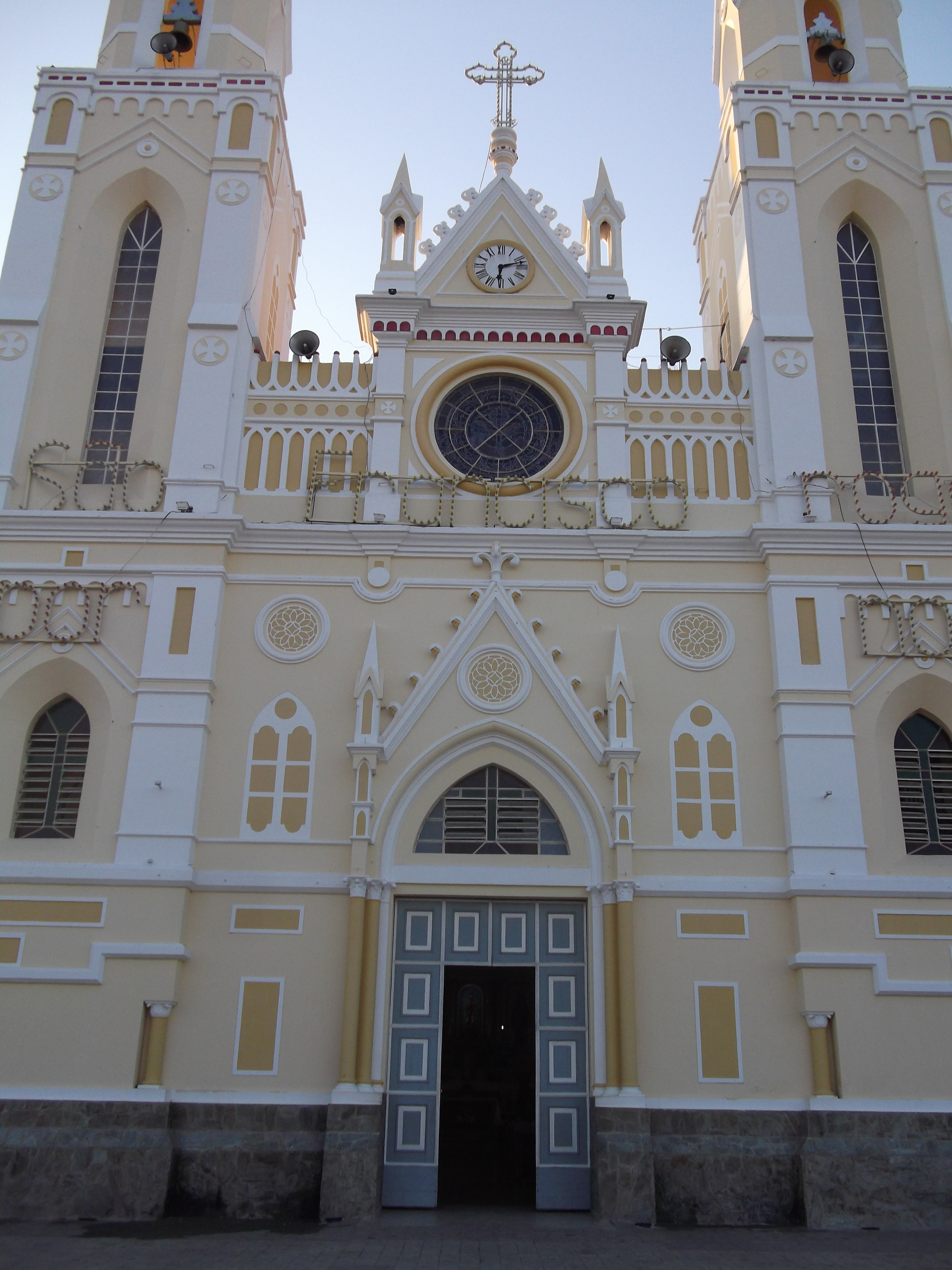 Basílica de São Francisco das Chagas (Canindé)